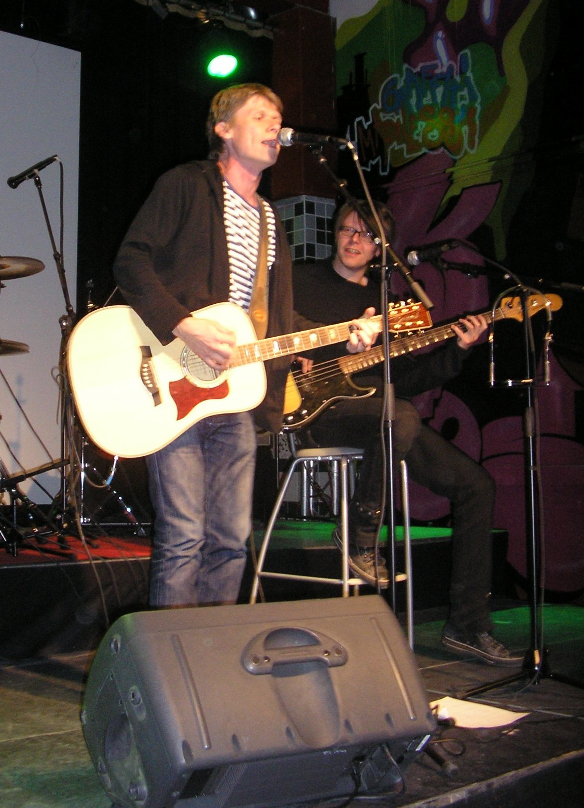 Roger Karlsson spelar på Hus1 i Jakobsberg